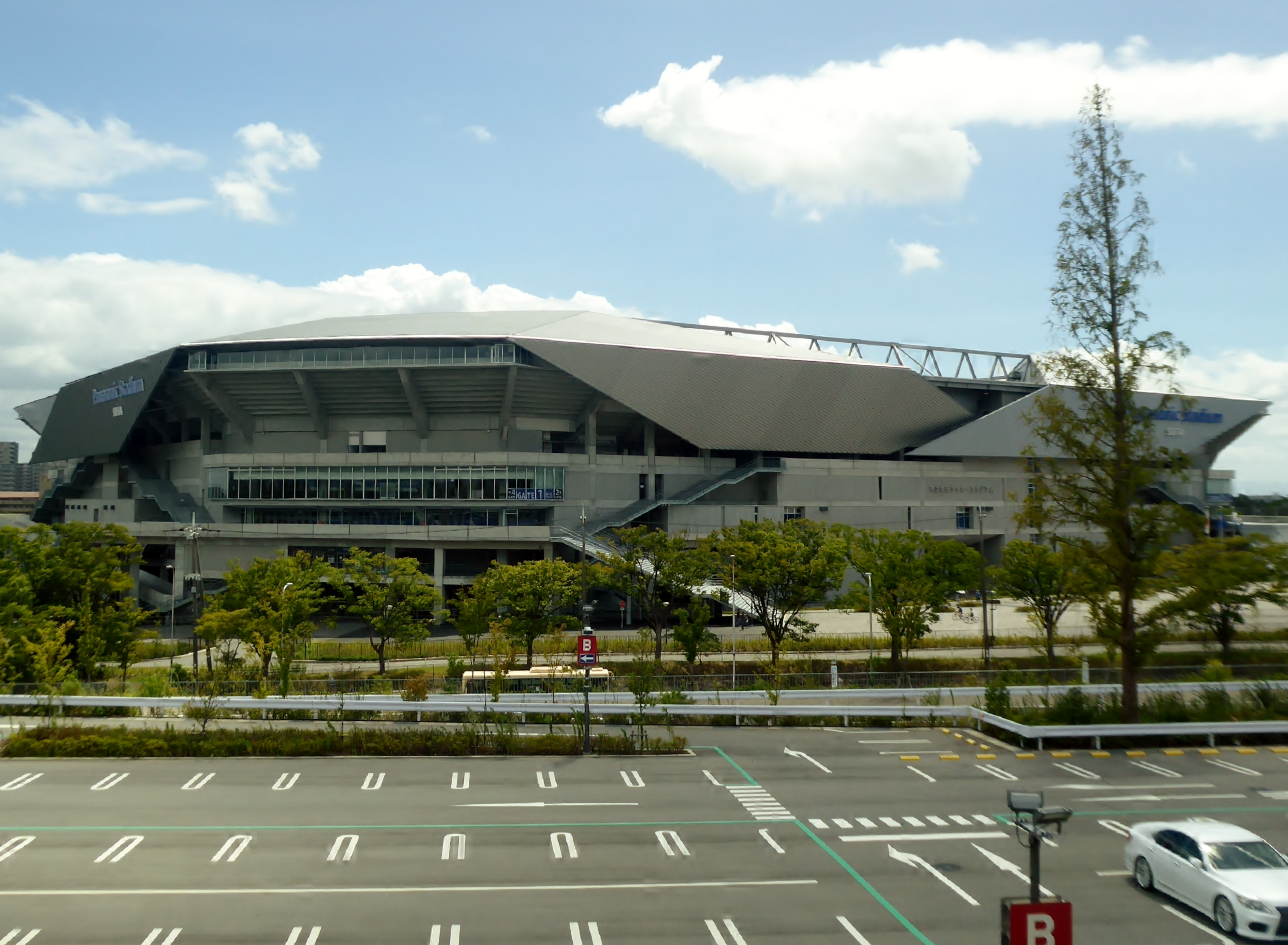 市立吹田サッカースタジアムを撮影。